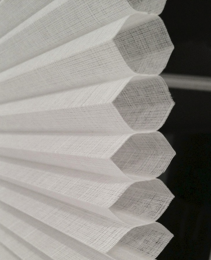 Detailaufnahme Wabenplissee